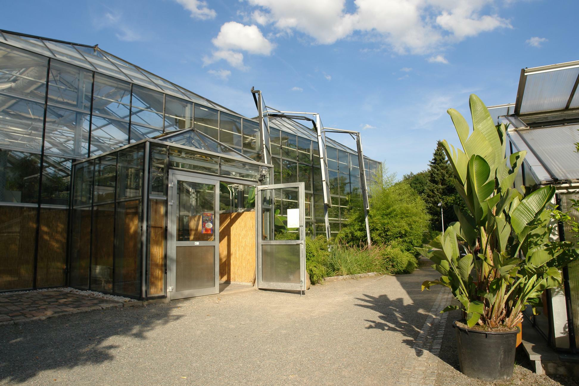 Gewächshäuser im Botanischen Garten Chemnitz